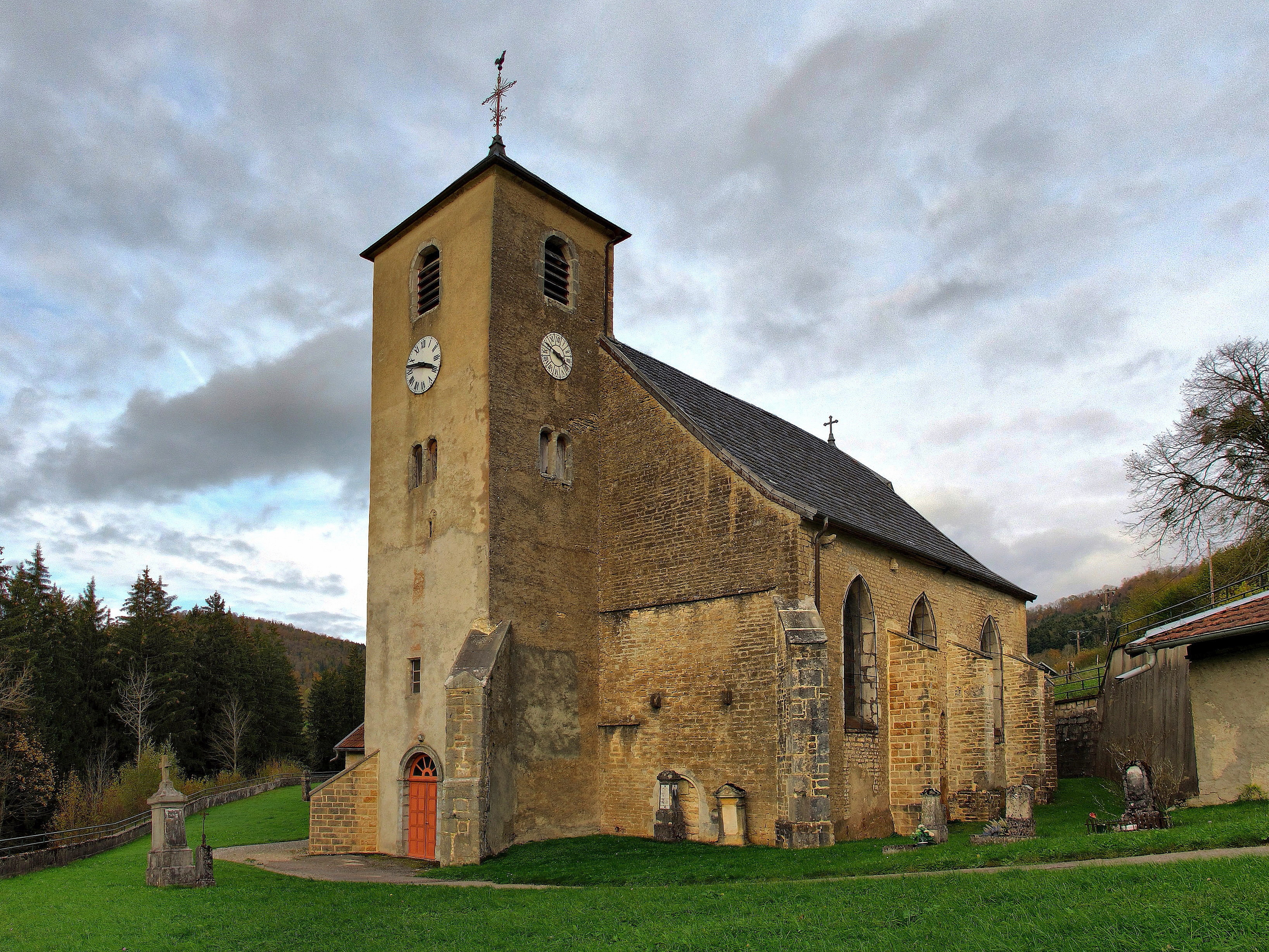 Inscrit aux monuments historiques sous le numéro PA00101658